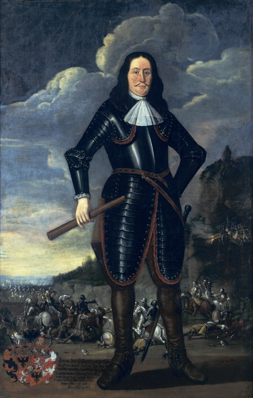 Porträt des kaiserlichen Feldherren Johann von Sporck